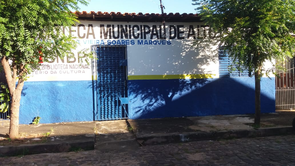 Biblioteca Municipal de Alto Longá.